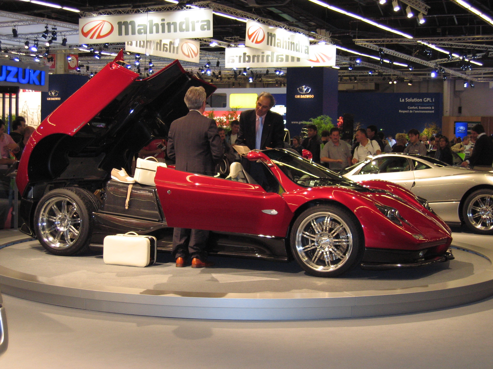 Pagani Zonda C12-S 7.3 Roadster op het Parijse autosalon van 2004. Eigen werk, vrij voor het publiek. Categorie:Afbeelding auto